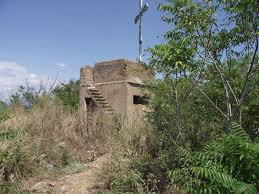 Артилерийски бункер при нос " Акин "